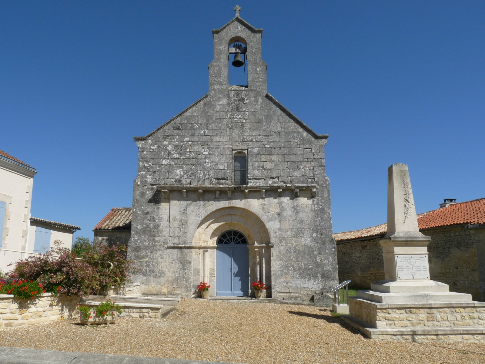 Eglise et monument aux morts, St-Grégoire-d'Ardennes, Charente-Maritime, France